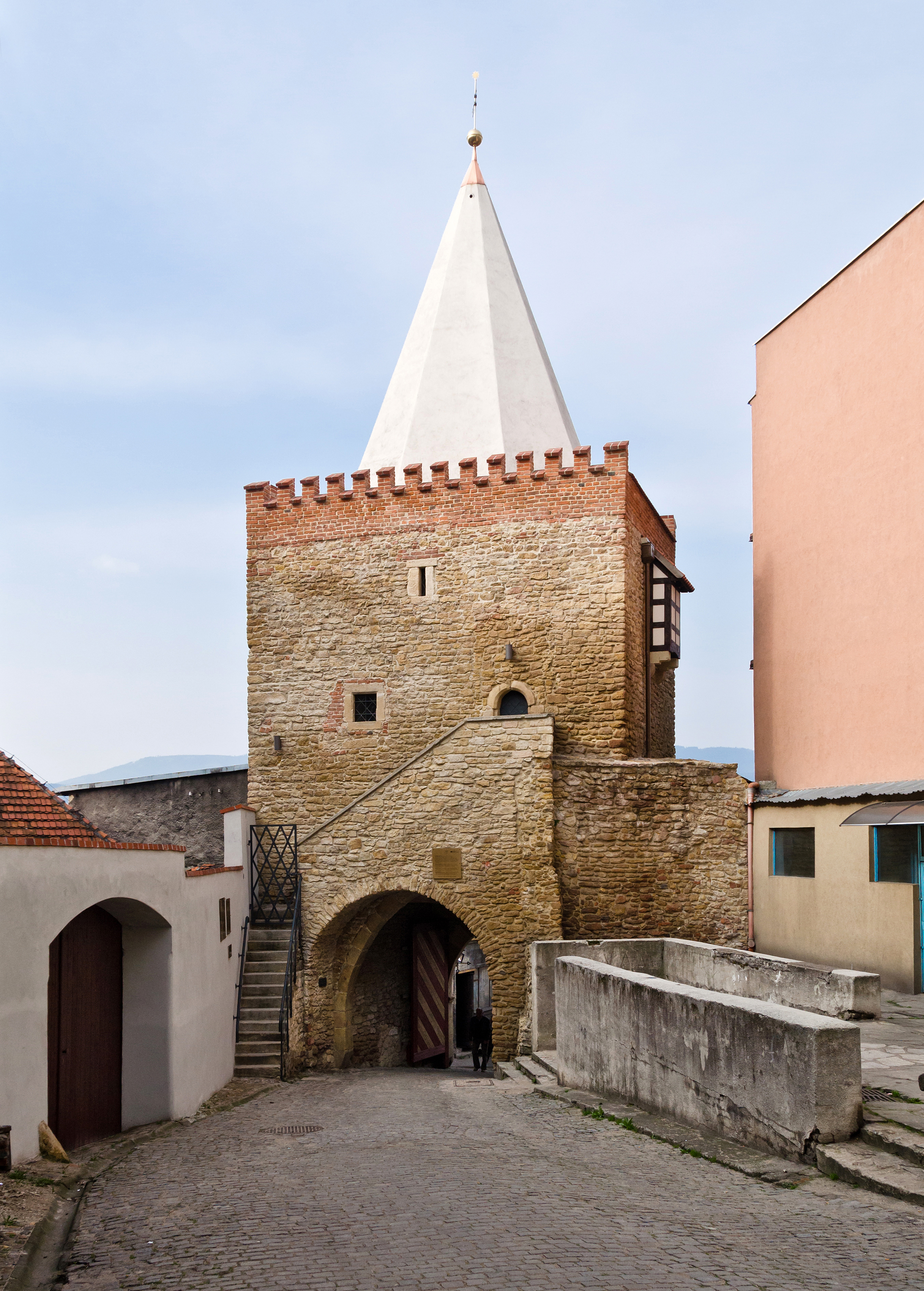 Bystrzyca Kłodzka, Brama Wodna, XIV